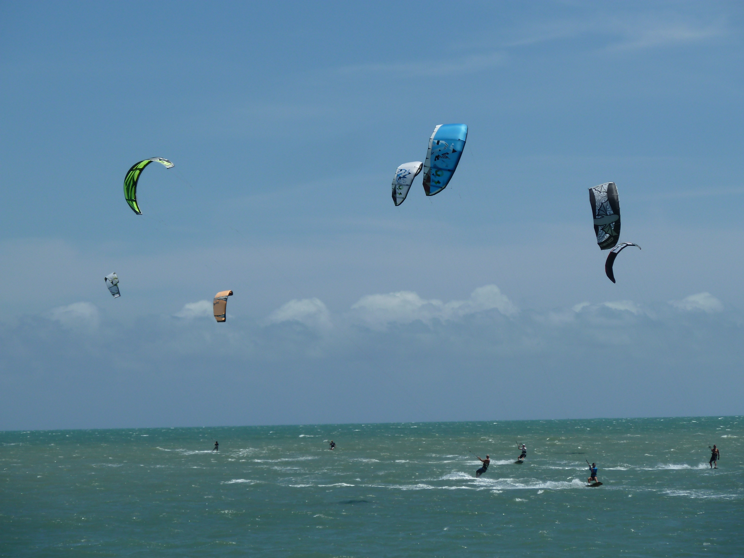 Cumbuco Beach, Fortaleza, Ceará, Brasil